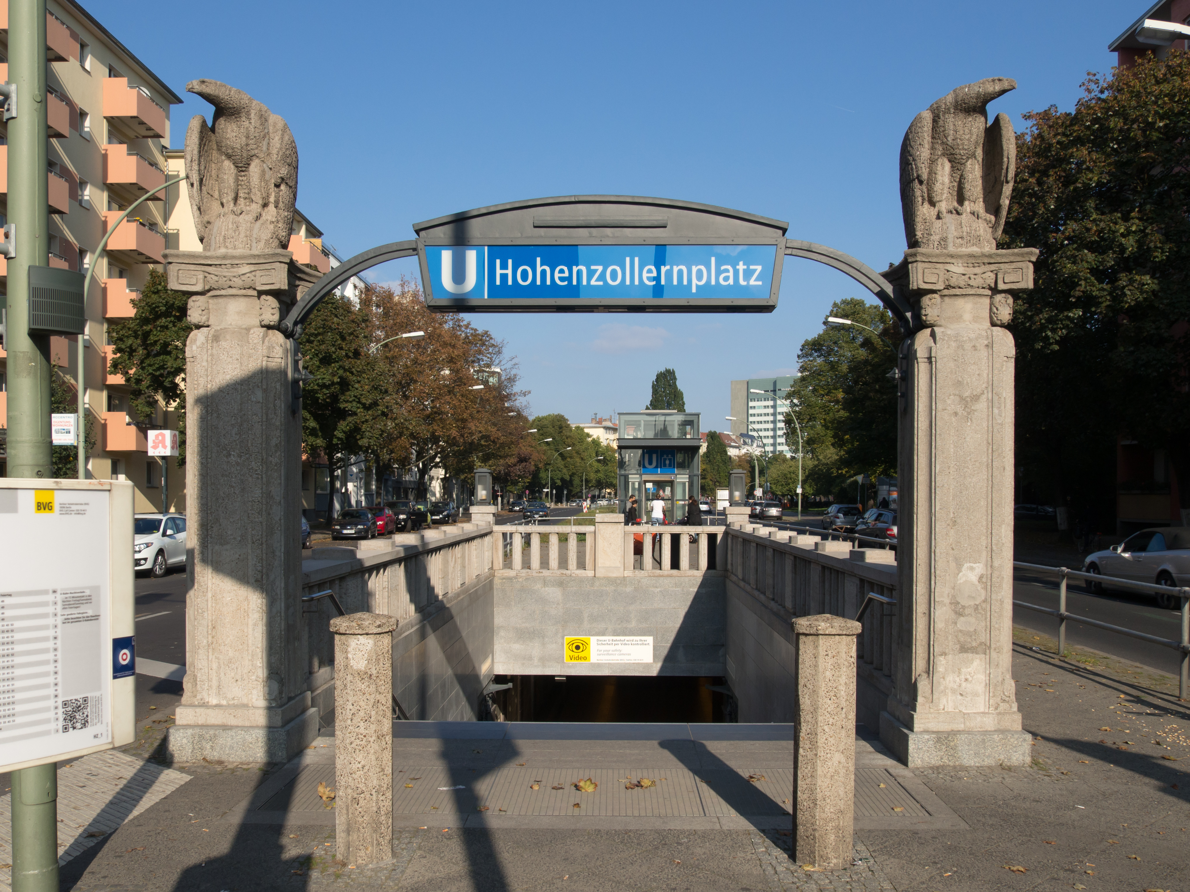 U-Bahnhof Hohenzollernplatz